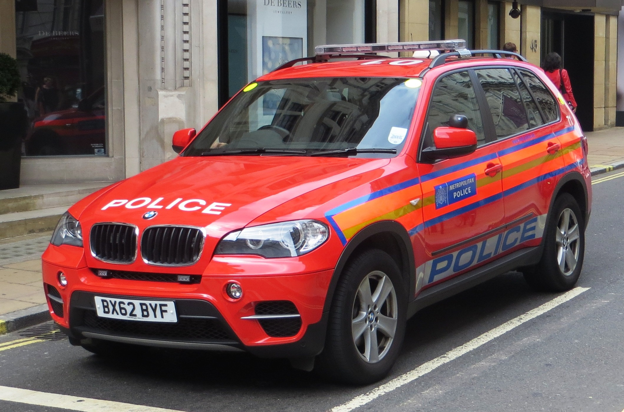 Politieauto in Londen